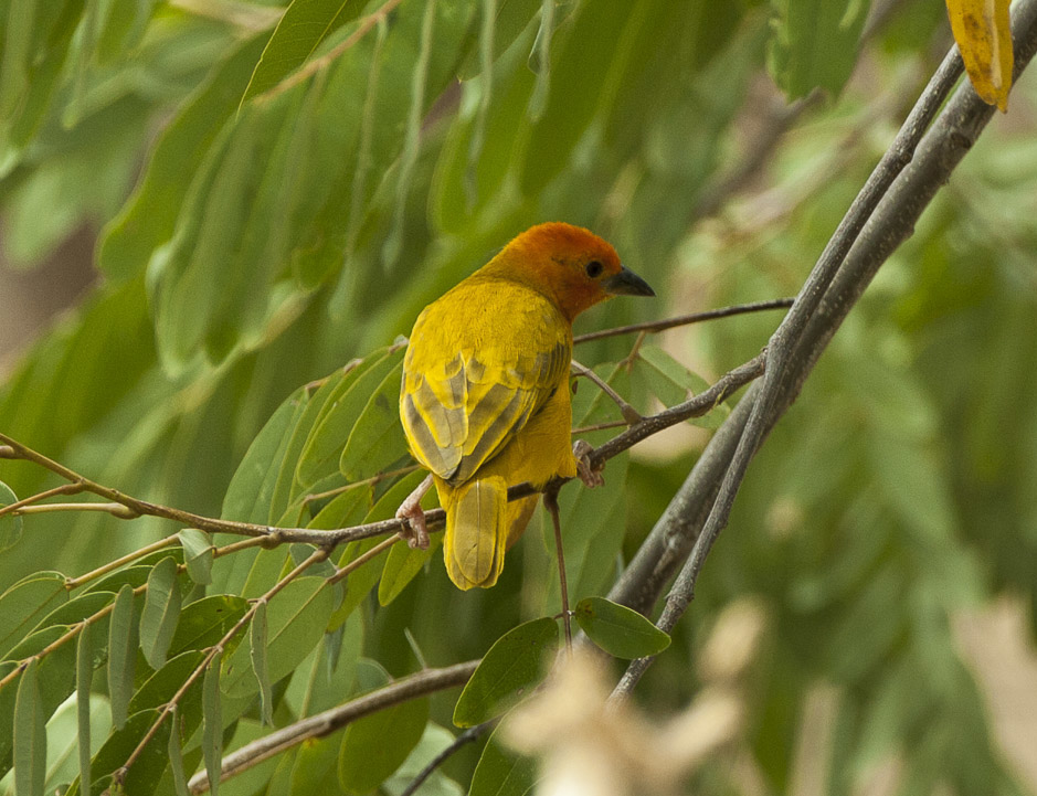 Golden Palm Weaver - Meru - Kenya_06_8317